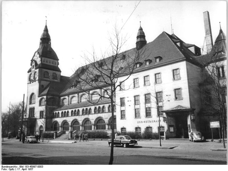 Leipzig, Zoo, Kongresshalle Zentralbild Opitz Ber-Noa 17.4.1957.Kongreßhalle in Leipzig. UBz: Außenansicht.